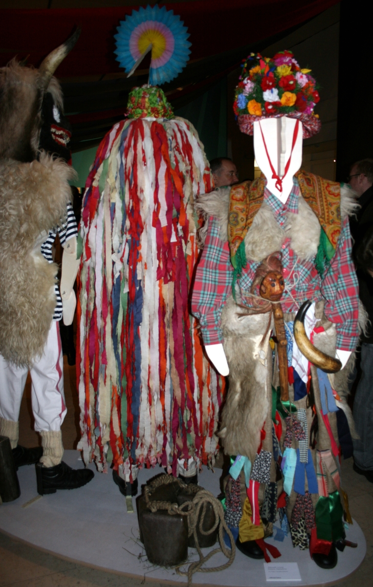 Rukavački zvončar u Etnografskom muzeju u Zagrebu, snimljen tijekom Noći muzeja